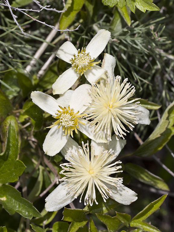 Lopez Canyon, San Luis Obispo Co., CA, USA. April 13